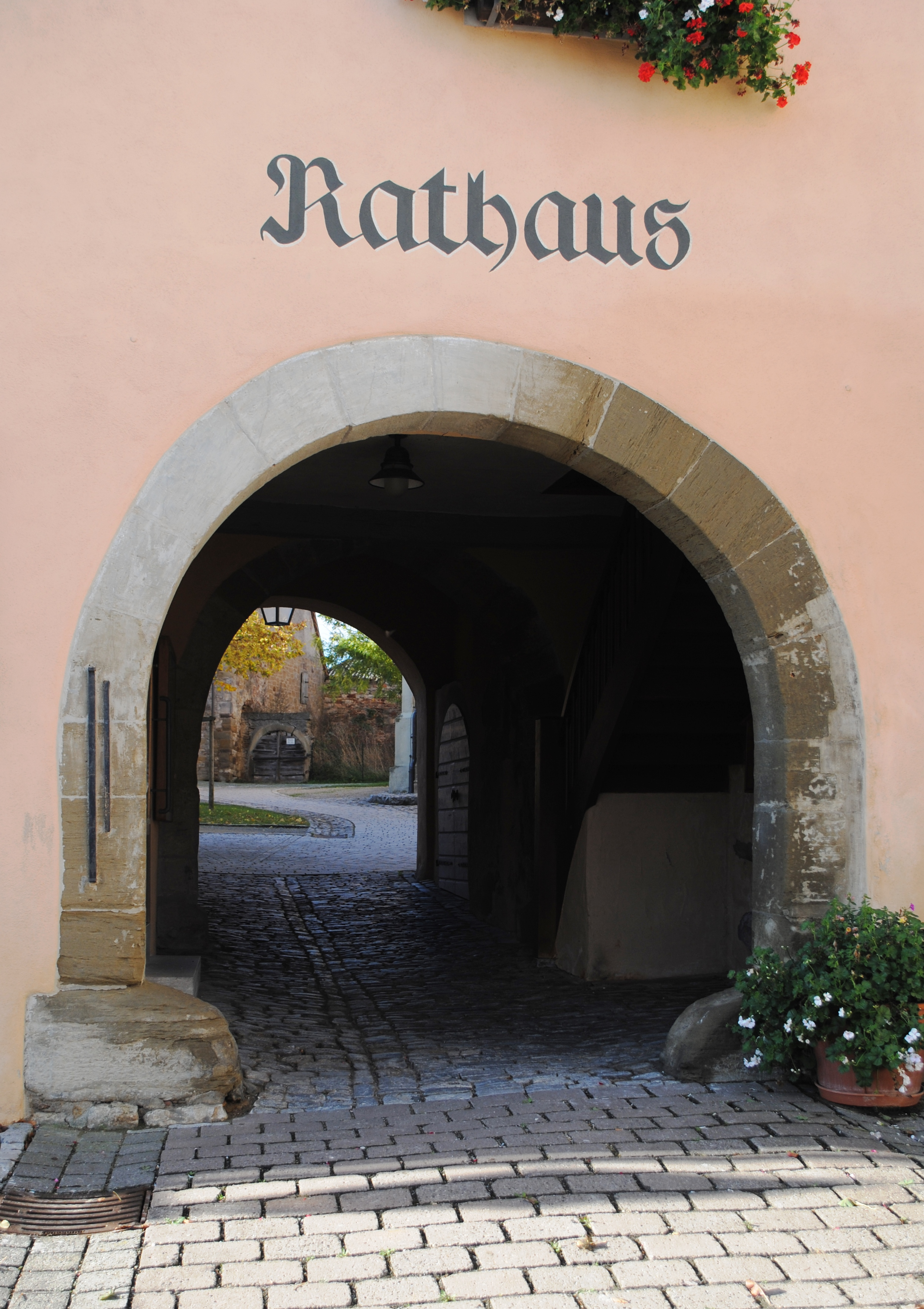 Rathausdurchgang, außen, Willanzheim